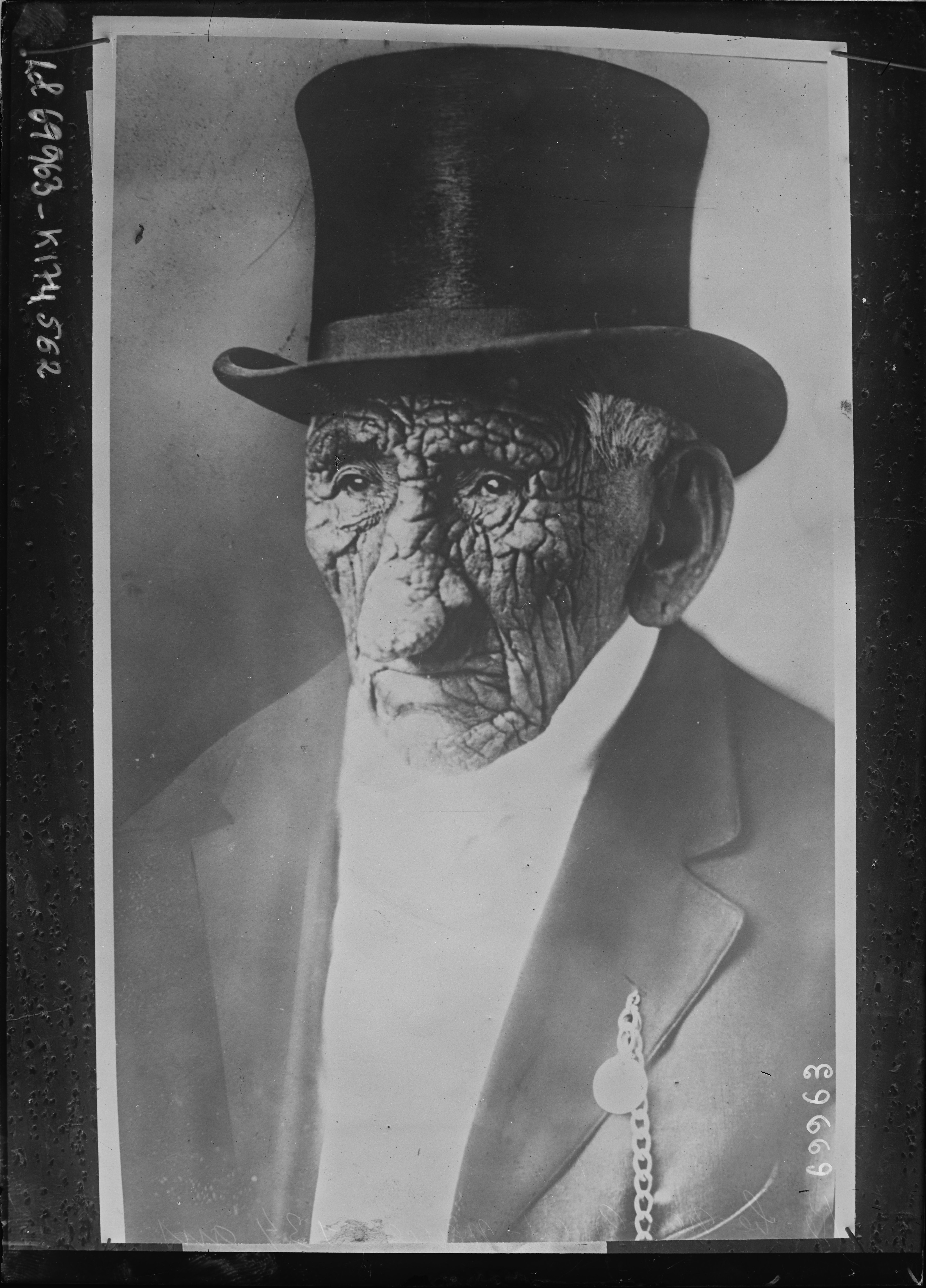 Ke-be-nah-gwey-wence, 134 ans [chef indien Chippewa].